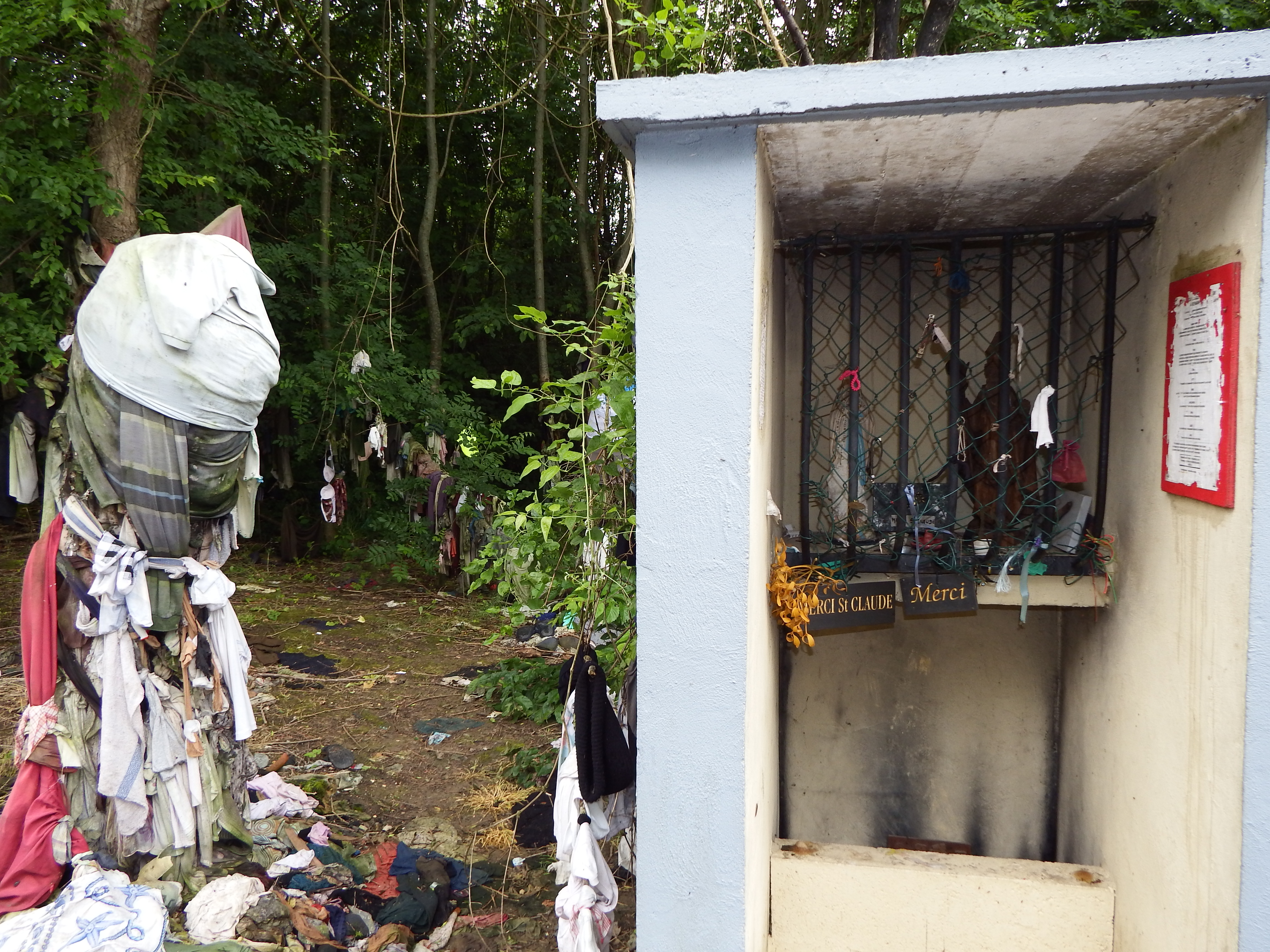 Arbre à loques de Saint Claude à Senarpont (Picardie, France). Les gens viennent ici pour demander la guérison d'une maladie. Ils prient et déposent un vêtement qui a été en contact avec la partie malade.